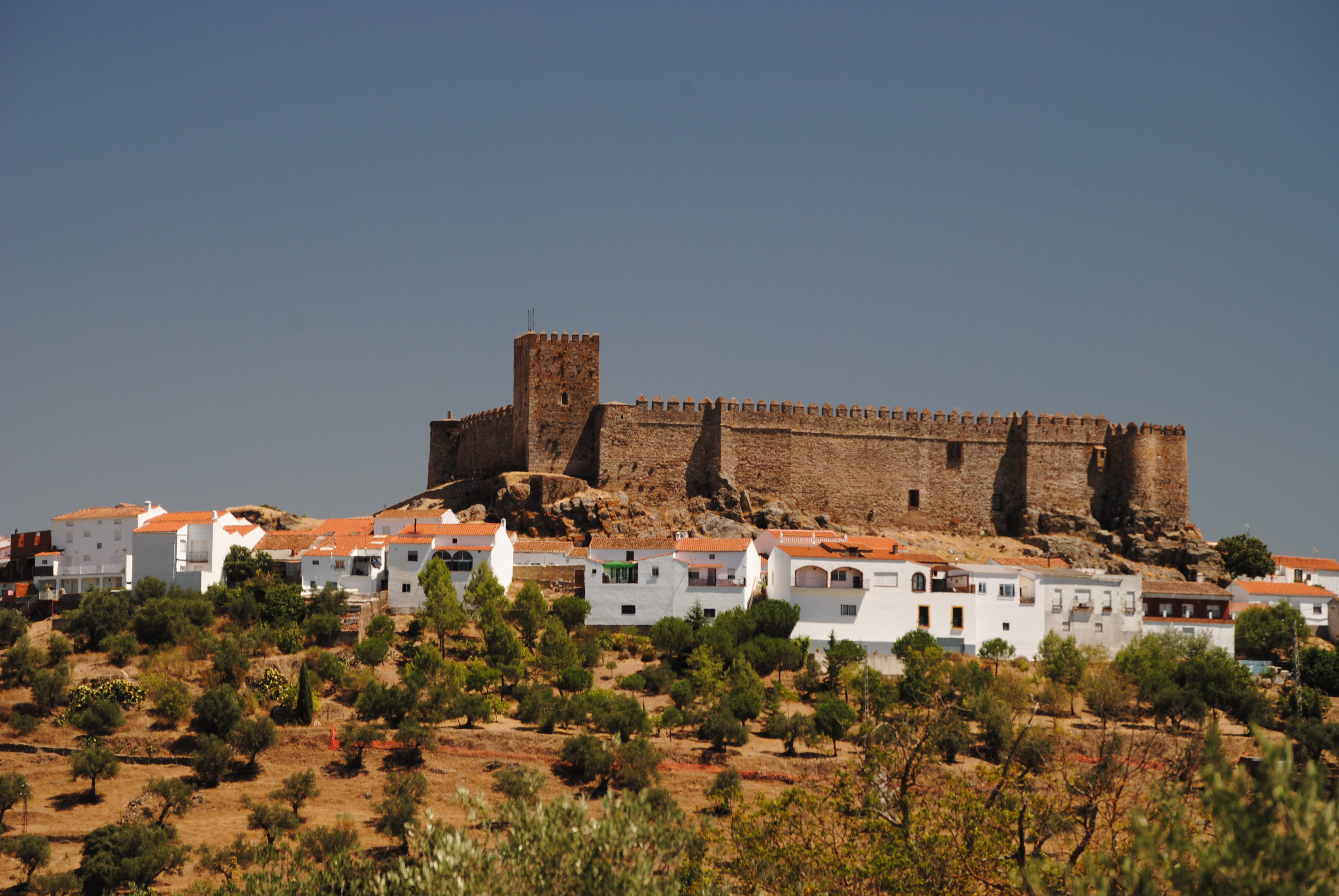 Segura de León, provincia de Badajoz, Extremadura, España.